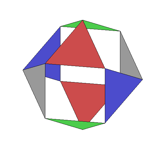 Action du groupe symétrique S4 sur le cuboctaèdre. Ce groupe permute les quatre paires de triangles opposés